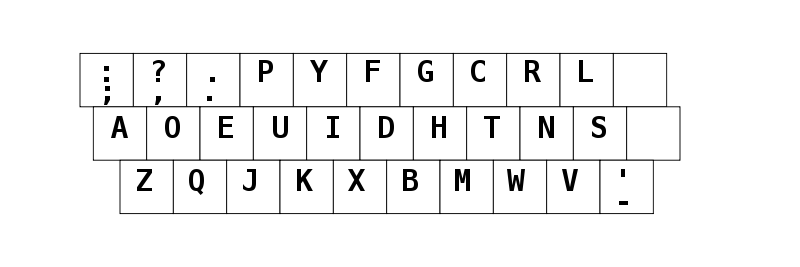 Diseño original del teclado Dvorak